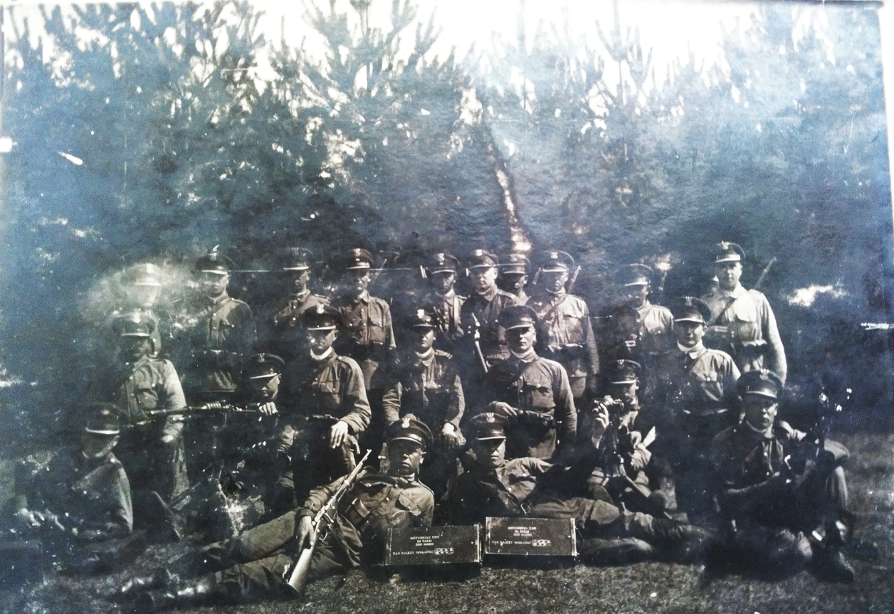 Żołnierze Korpusu Ochrony Pogranicza Baon 15 Ludwikowo